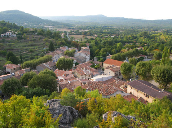 Le village de Mazaugues, Var, France